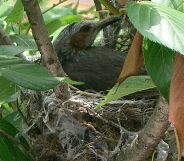 Hypsipetes_amaurotis